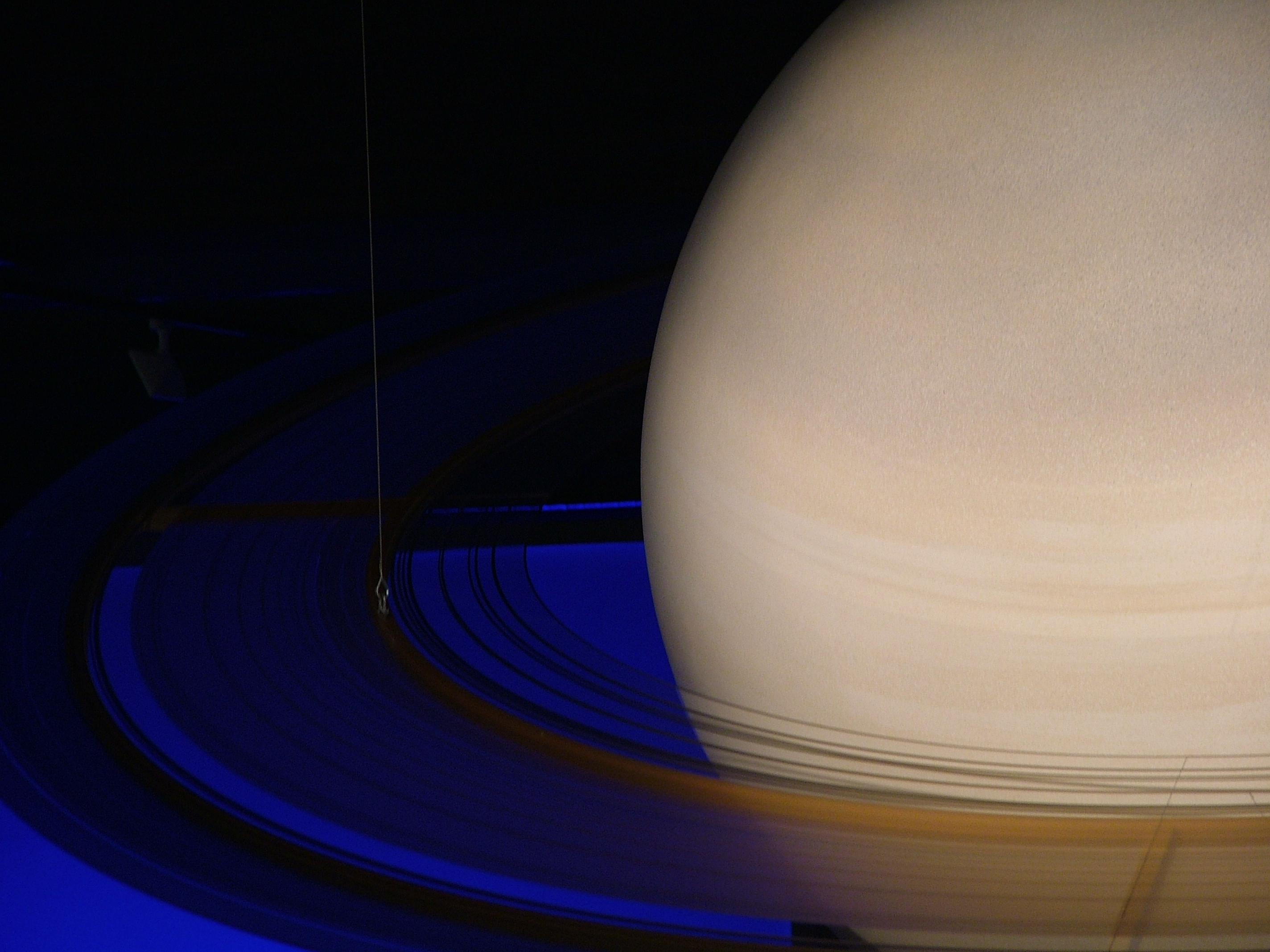 Saturn (sculpture), in exhibition "Sternstunden" in Oberhausen.